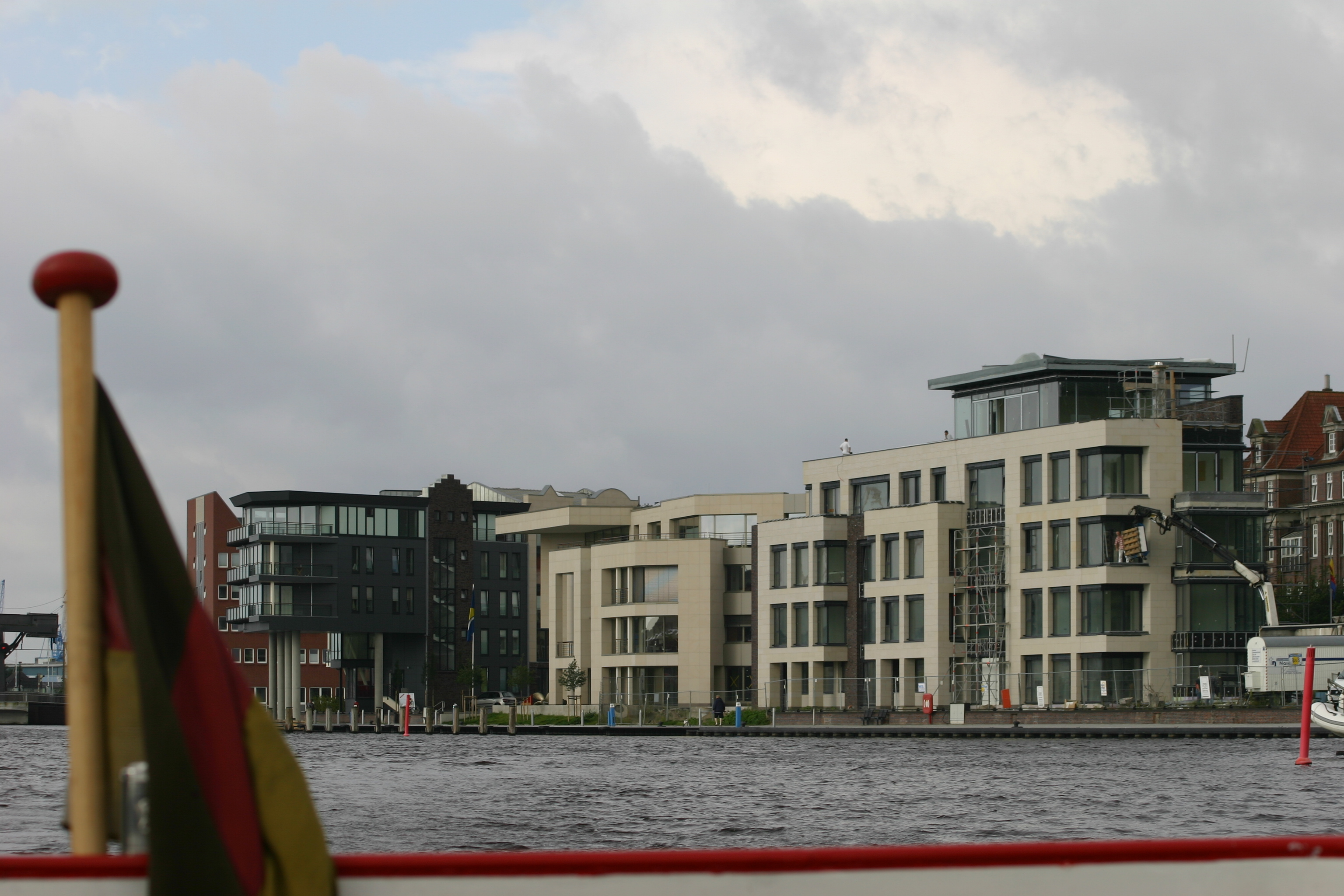 Teilansicht der "Wasserstadt" in Emden, einem Vorhaben zur Revitalisierung vormals brach liegender Hafenflächen